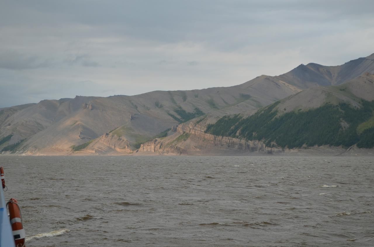 Берега Лены, Булунский район. Это хребет Туора-Сис - западный отрог Хараулахского хребта, непосредственно примыкающий к реке Лена